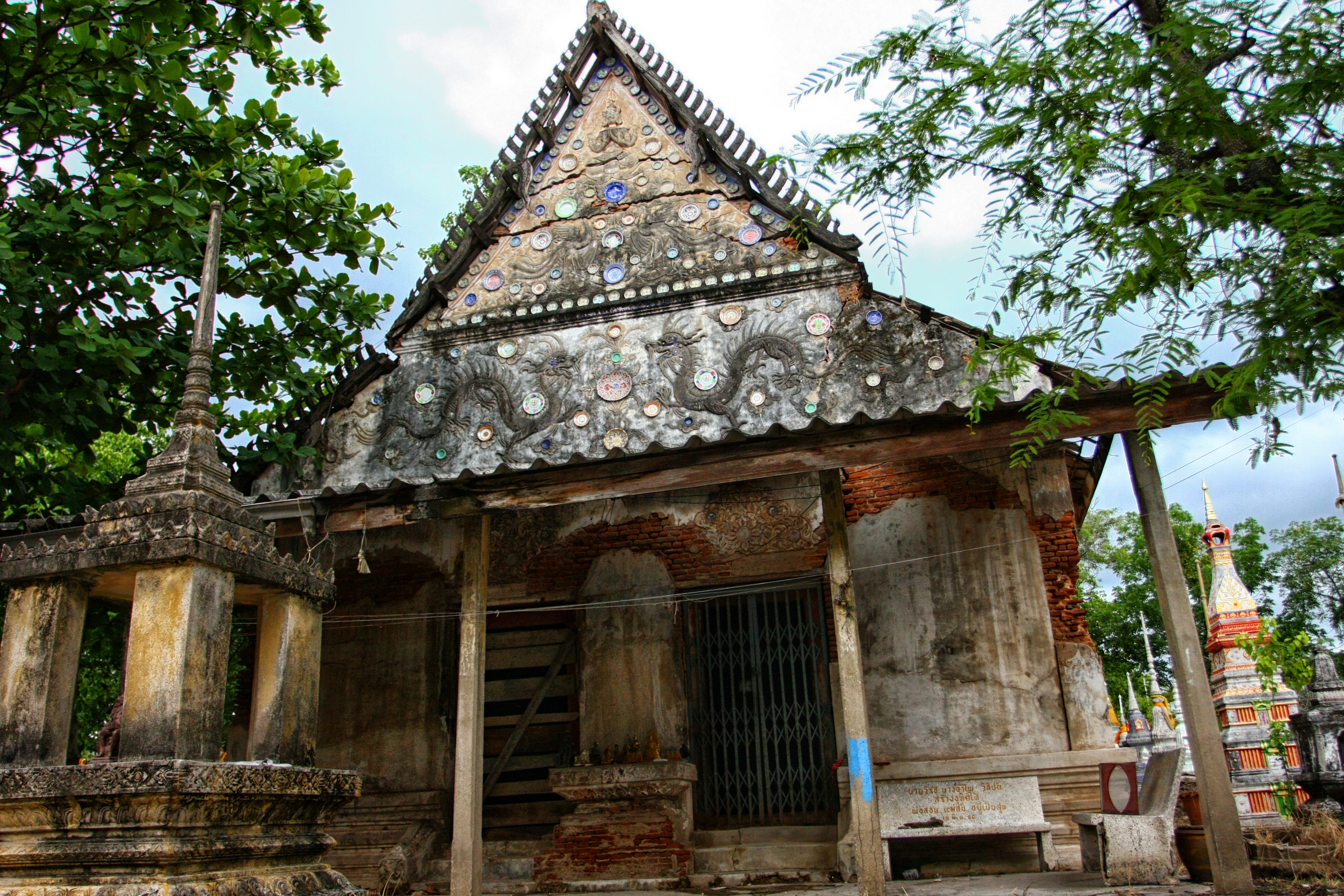 วัดราษฎร์บำรุง(หงอนไก่)